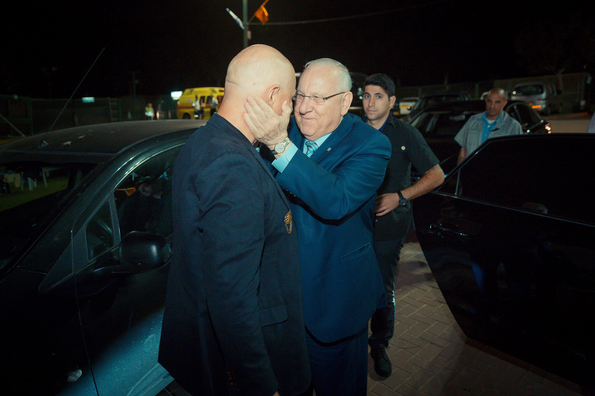 יאיר והנשיא ריבלין